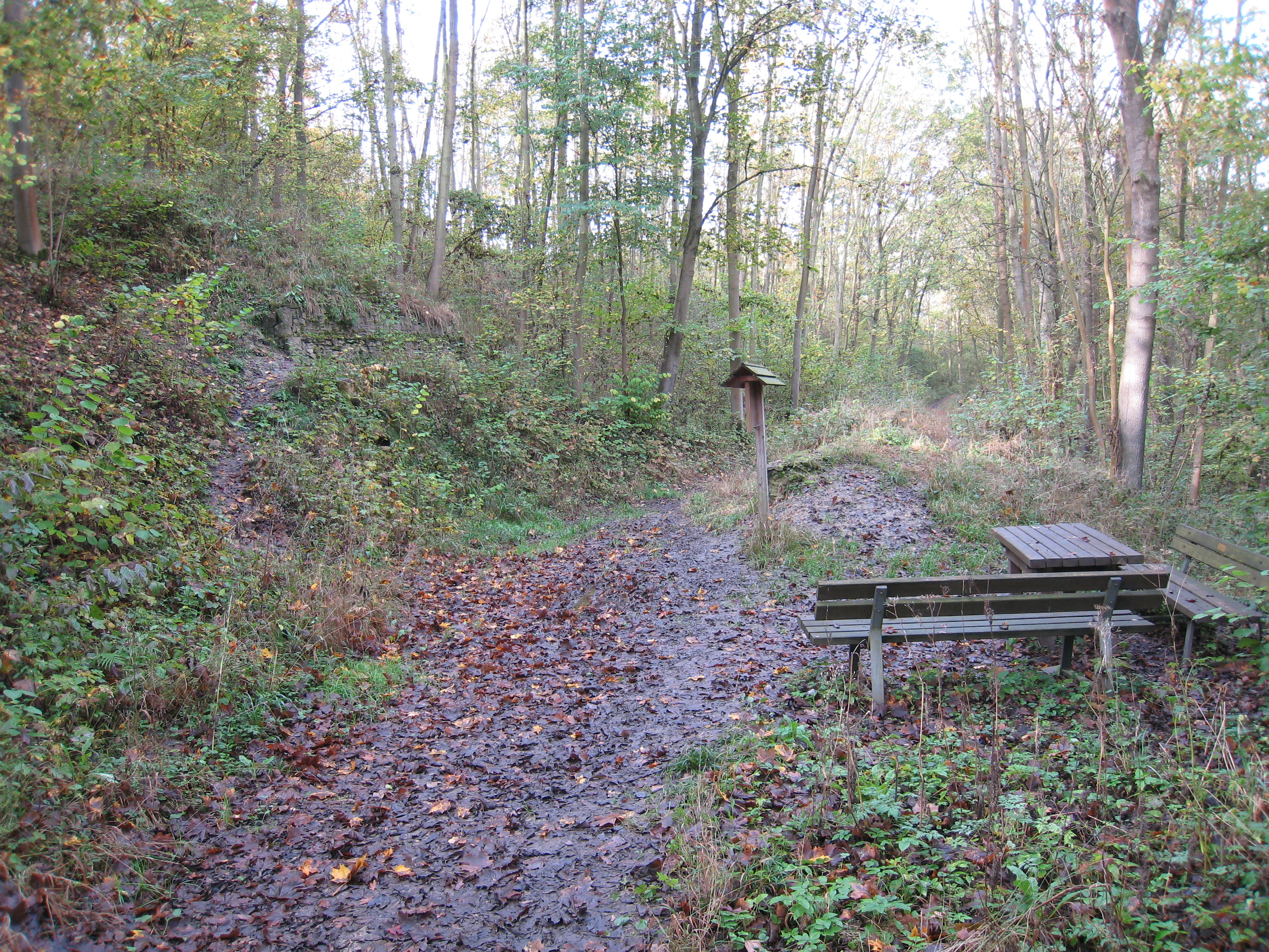 Ehemalige Schisprungschanze im Rhodaer Grund, Erfurt